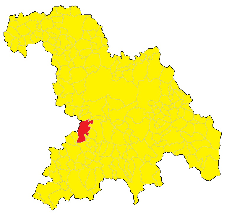 Mappa del comune di Cassine (AL)